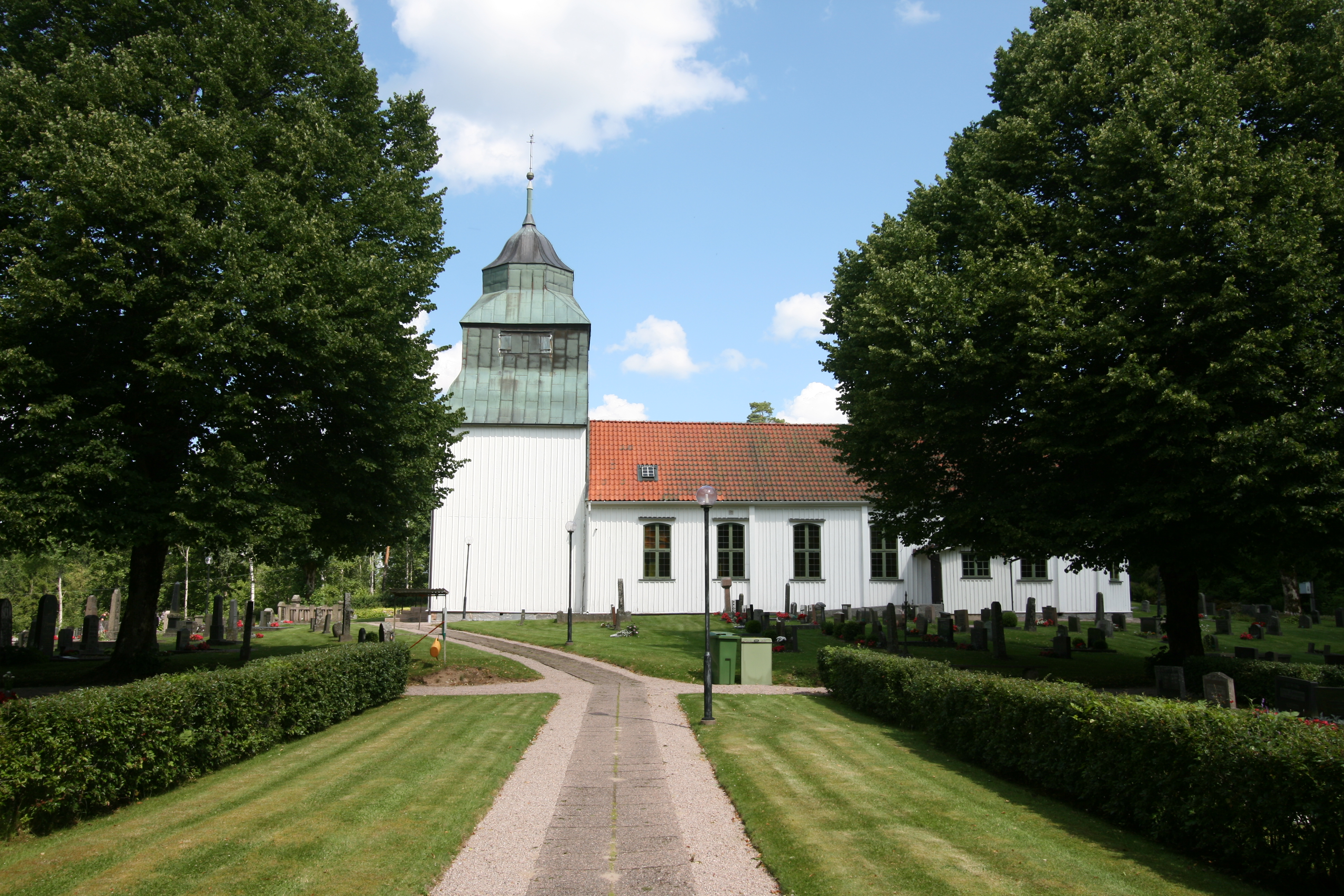 Ljushults kyrka